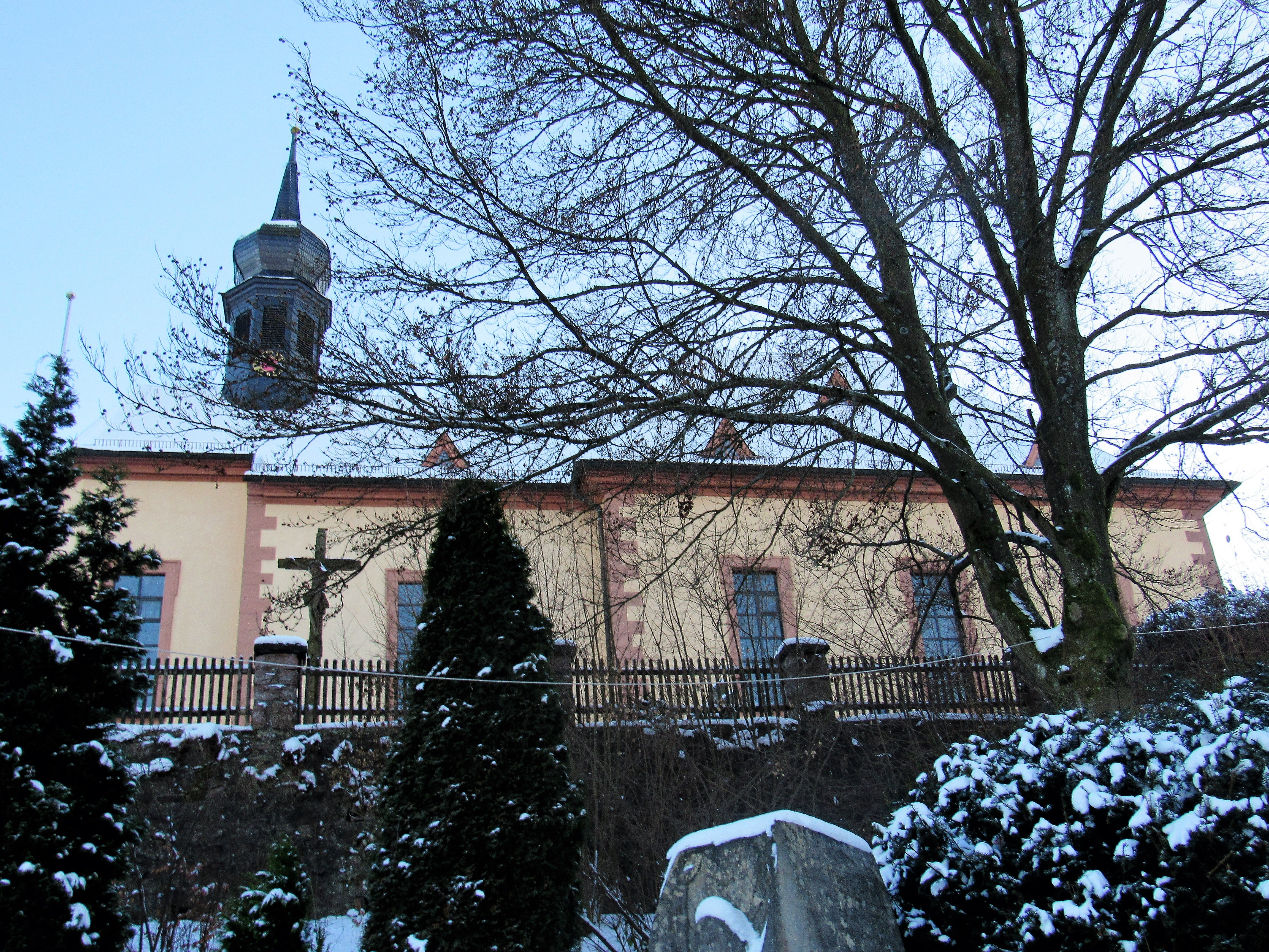 Kirche von Wildflecken